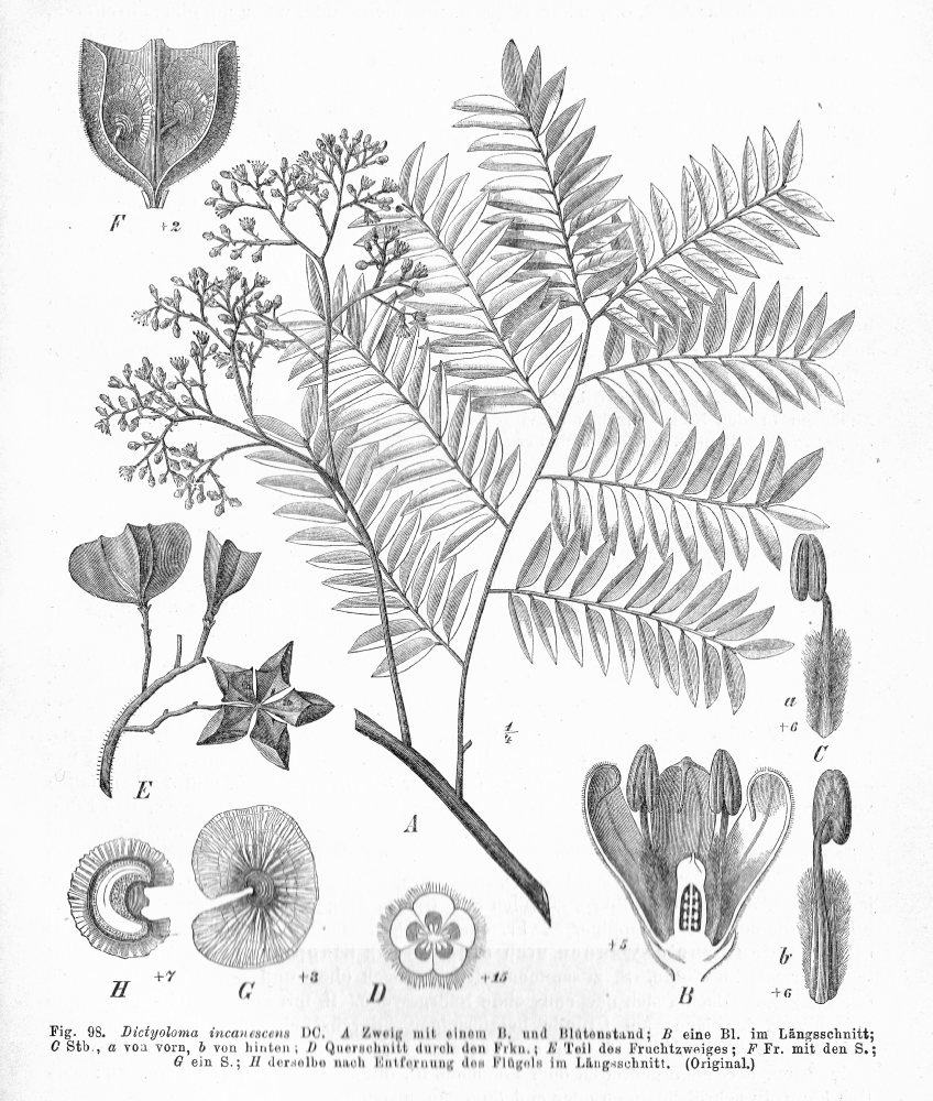 Dictyoloma incanescens Drawing from Die naturlichen Pflanzenfamilien. Vol. 3. Fig 98.